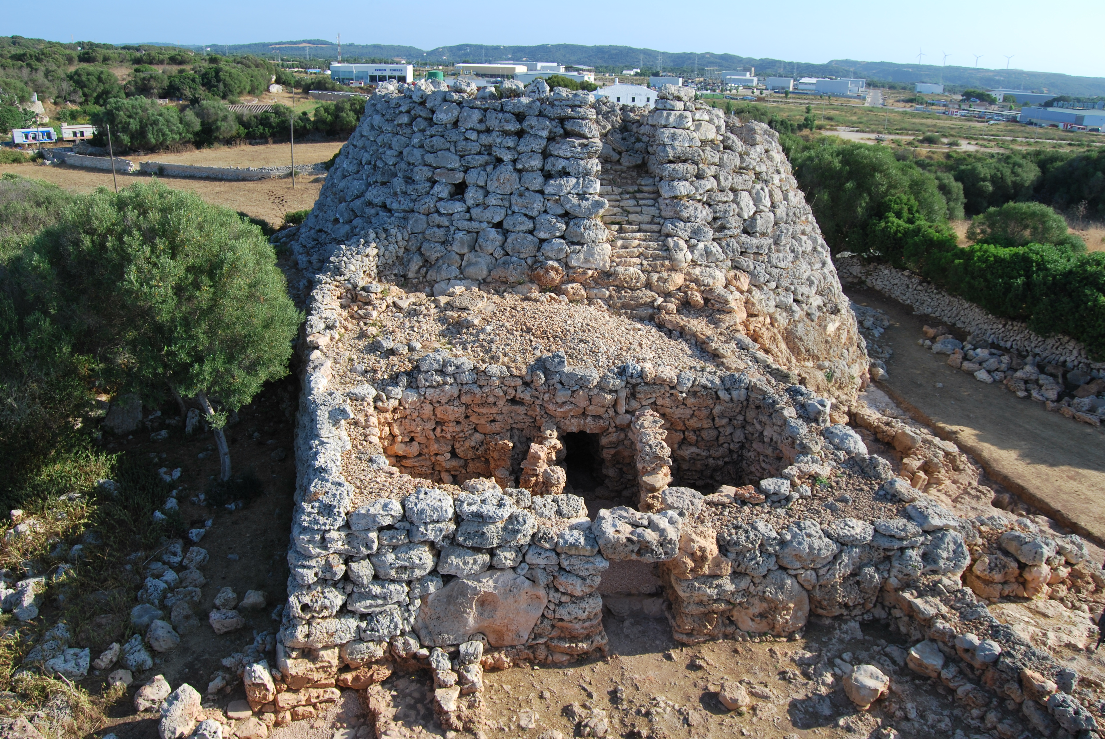 Talaiot oest de Cornia Nou (Menorca) vist des del sud. S'hi observa un gran edifici adosat.